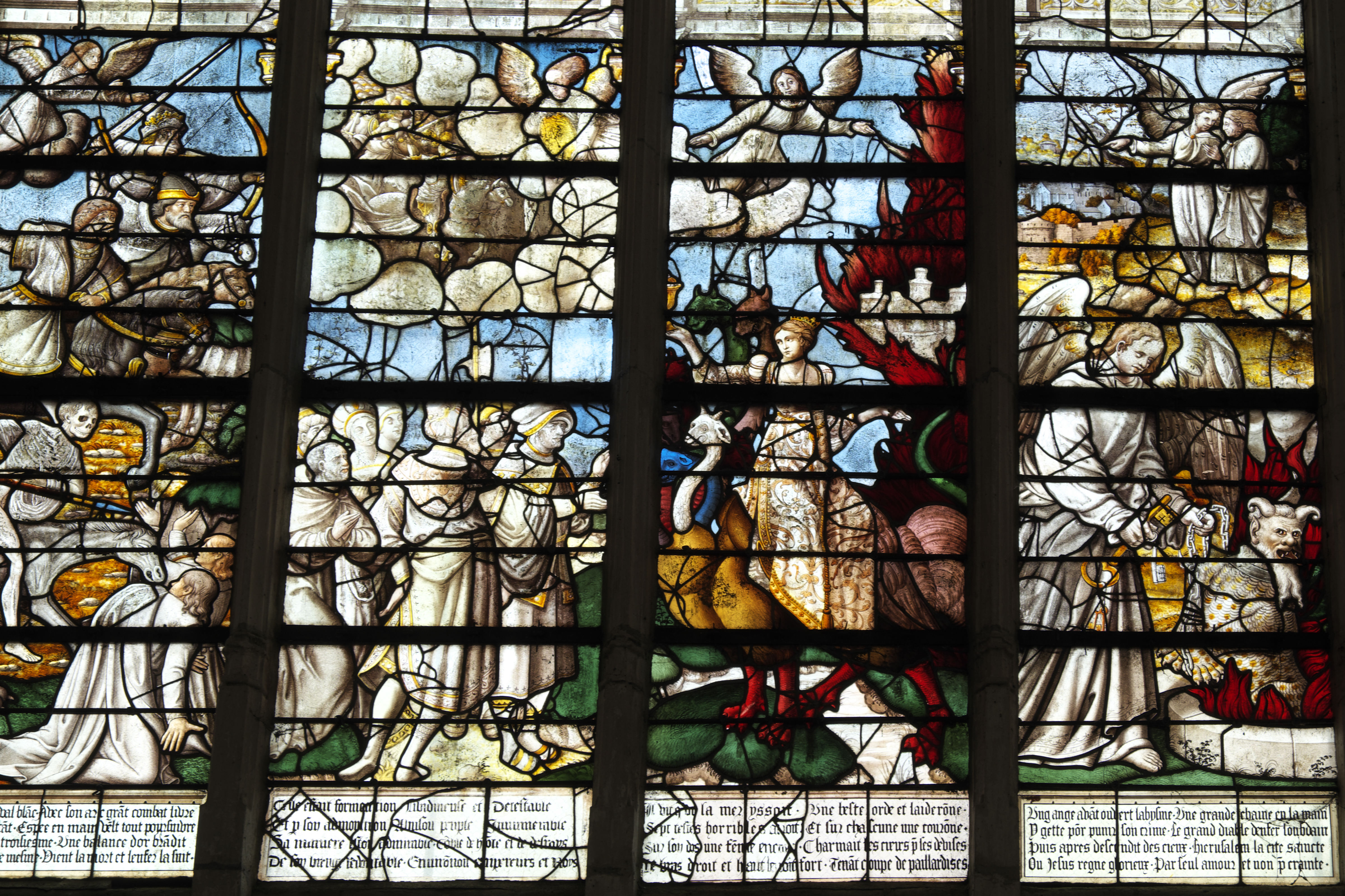 Katholische Kirche Saint-Georges in Chavanges im Département Aube (Champagne-Ardenne/Frankreich), Bleiglasfenster aus dem 16. Jahrhundert, Darstellung: Apokalypse, Hure Babylon (Mitte).